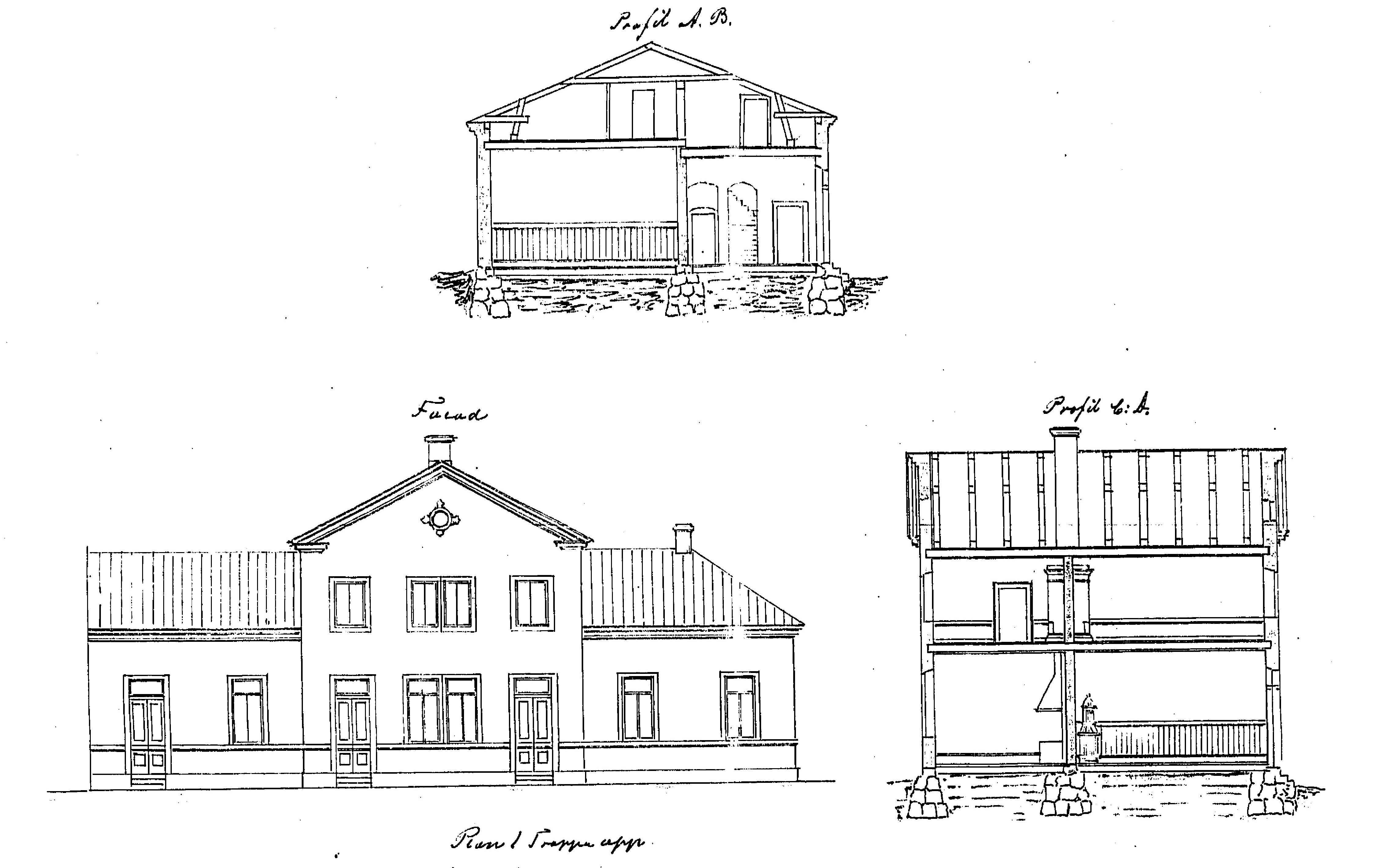 "Utskänkningslokal" i kvarteret Fyrkanten (numera Konsthallen) på Djurgården